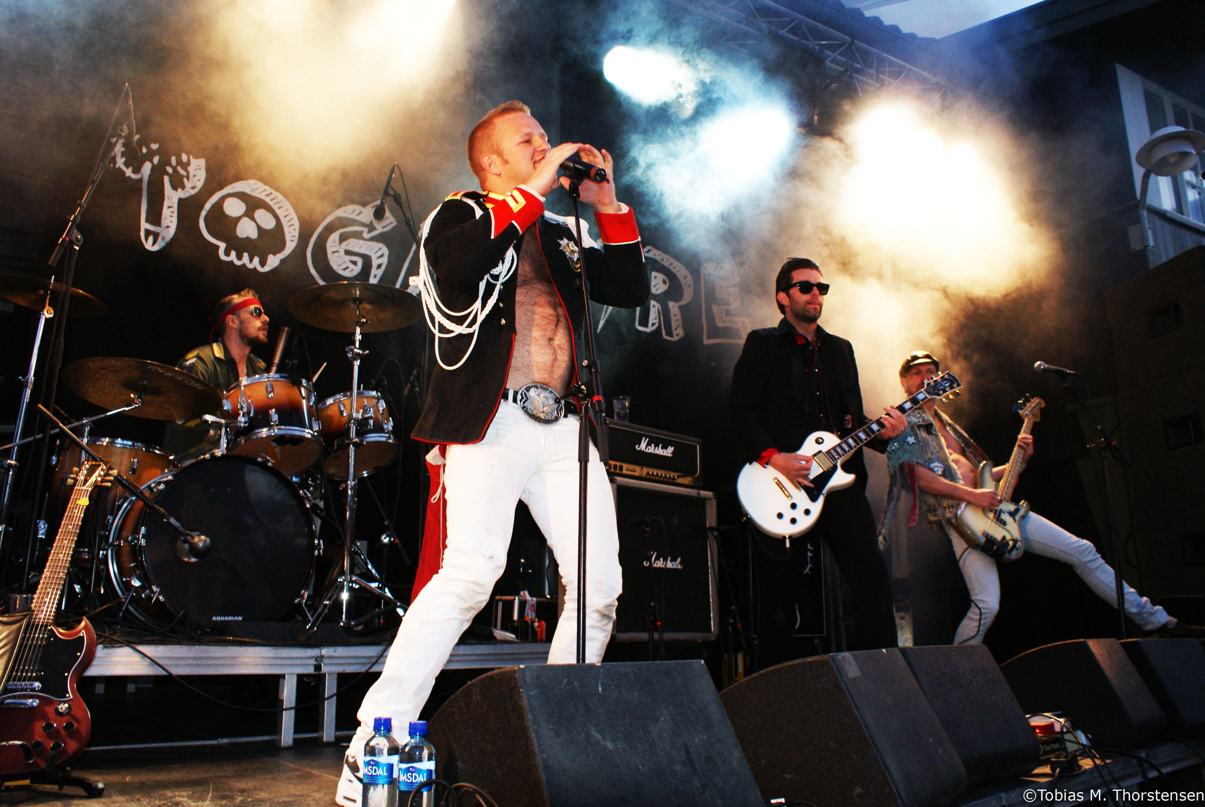 Bilde Yoga Fire konsert. Tatt av: Tobias Moe Thorstensen.